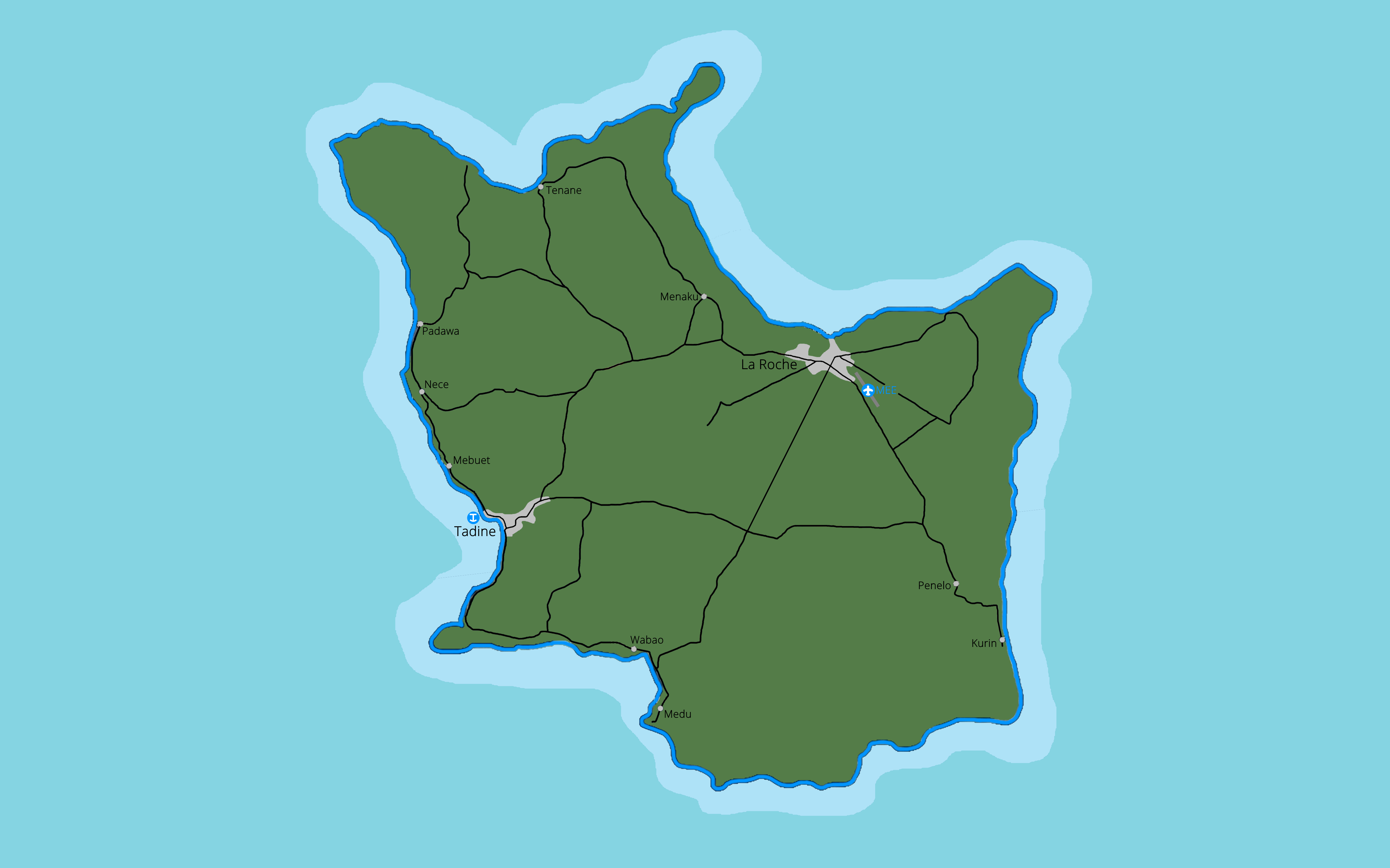 Karte der französischen Insel Maré